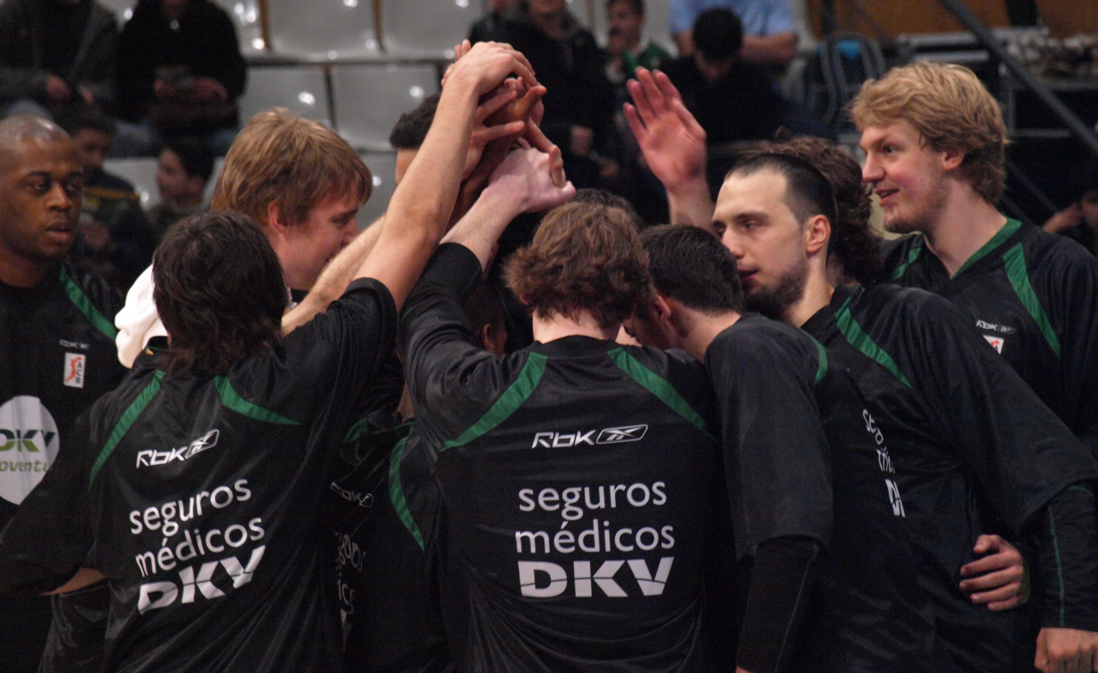 Plantilla del DKV Joventut en el partido que les enfrentó al Pamesa Valencia en el pabellón Olímpico de Badalona de liga ACB en abril de 2009